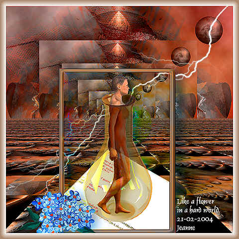 Eigen werk: Jeanne Adema